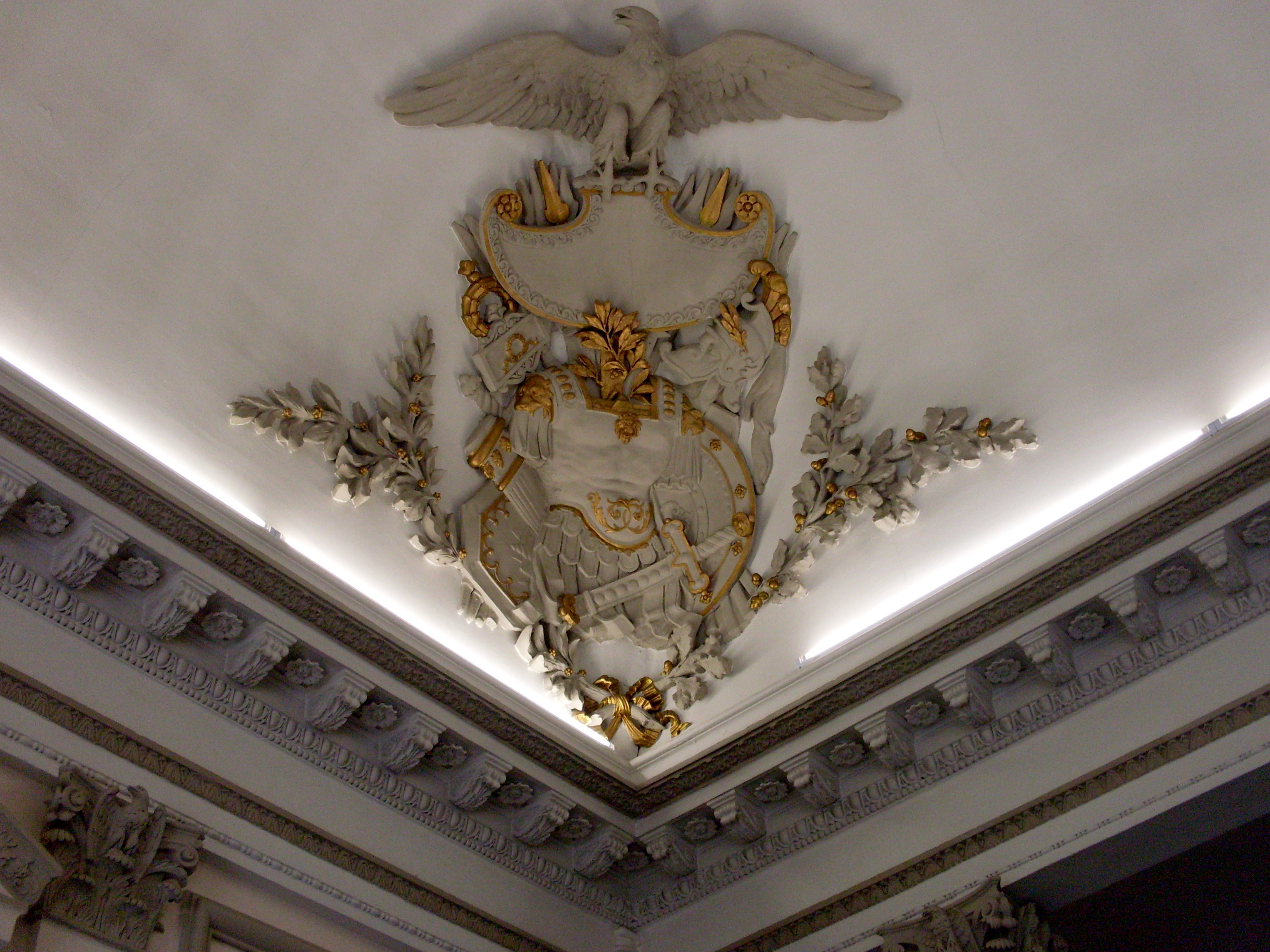 Stuc au plafond du Palais Niel, Toulouse